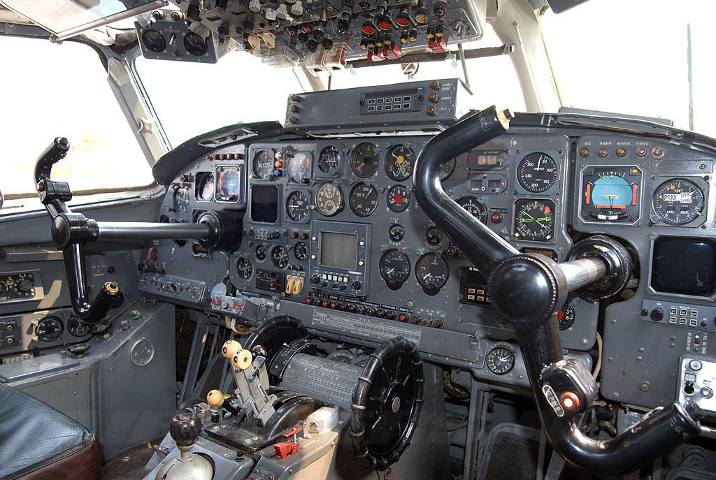 B-3468 at Guangzhou - Baiyun (CAN / ZGGG)